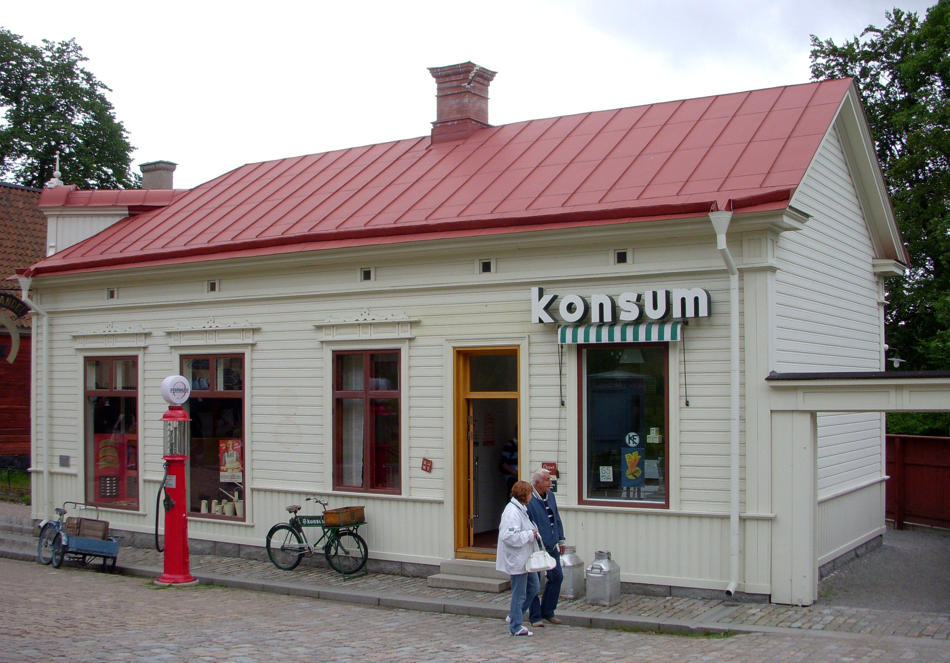 Konsum-butiken på Skansen, Stockholm